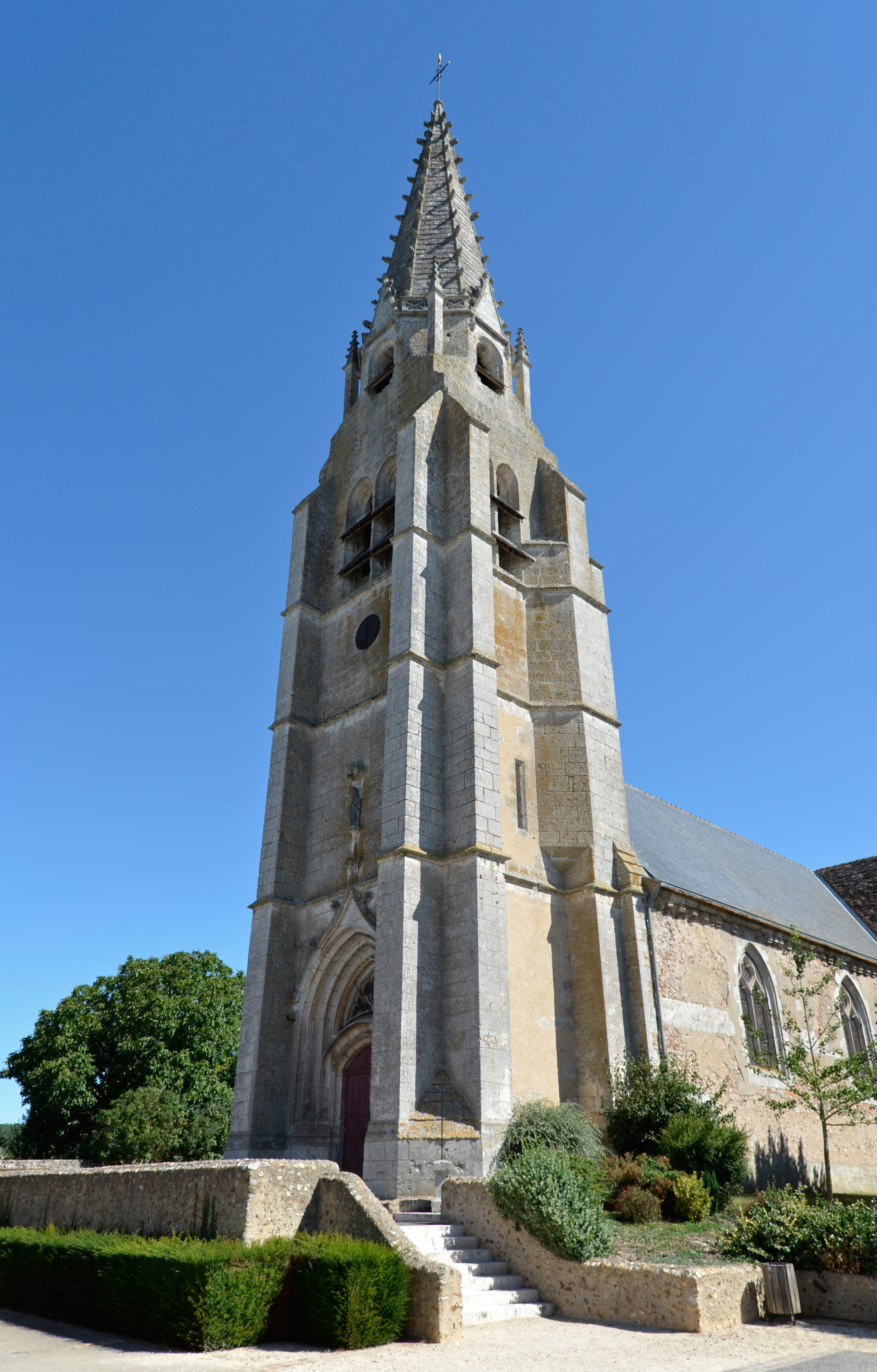 Église Saint-Pierre de Marboué - Eure-et-Loir .